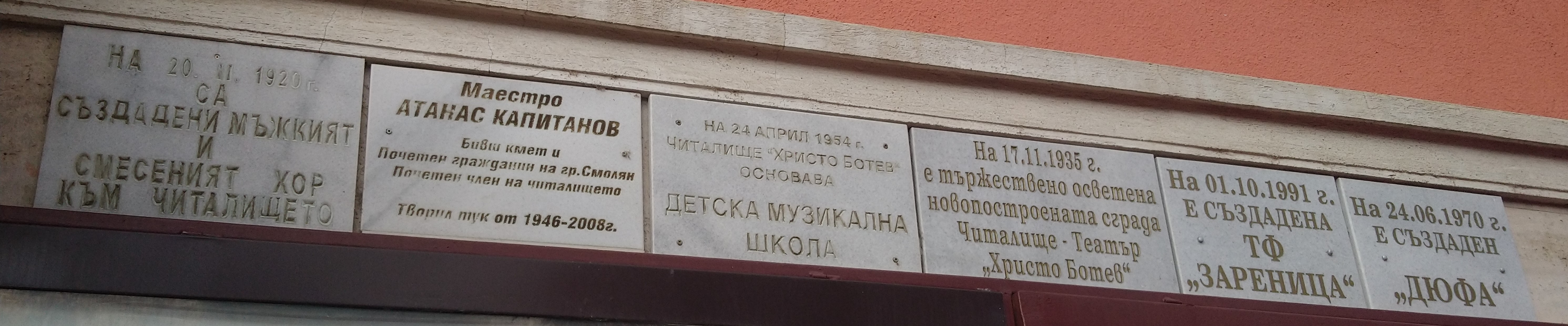 Смолян - читалище Христо Ботев - паметни плочи